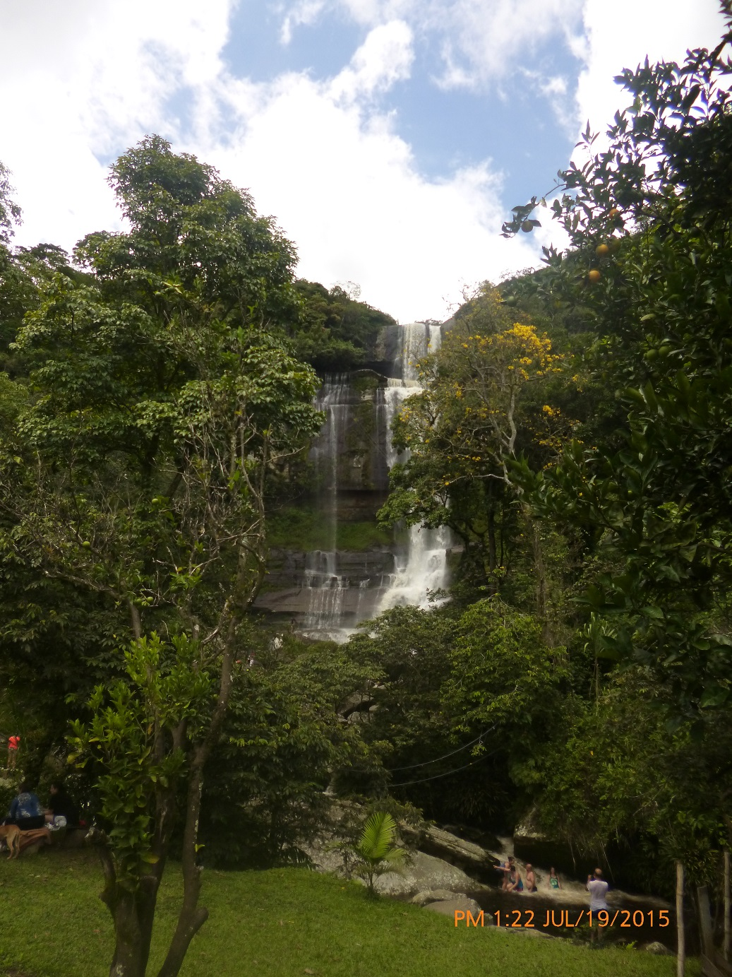 Cascada de los caballeros- San Jose de Suaita